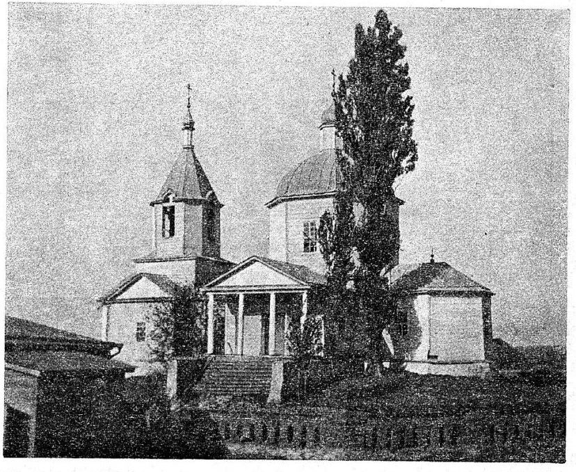 Ростовская область. Церковь Николая Чудотворца в Николаевке-Янове.